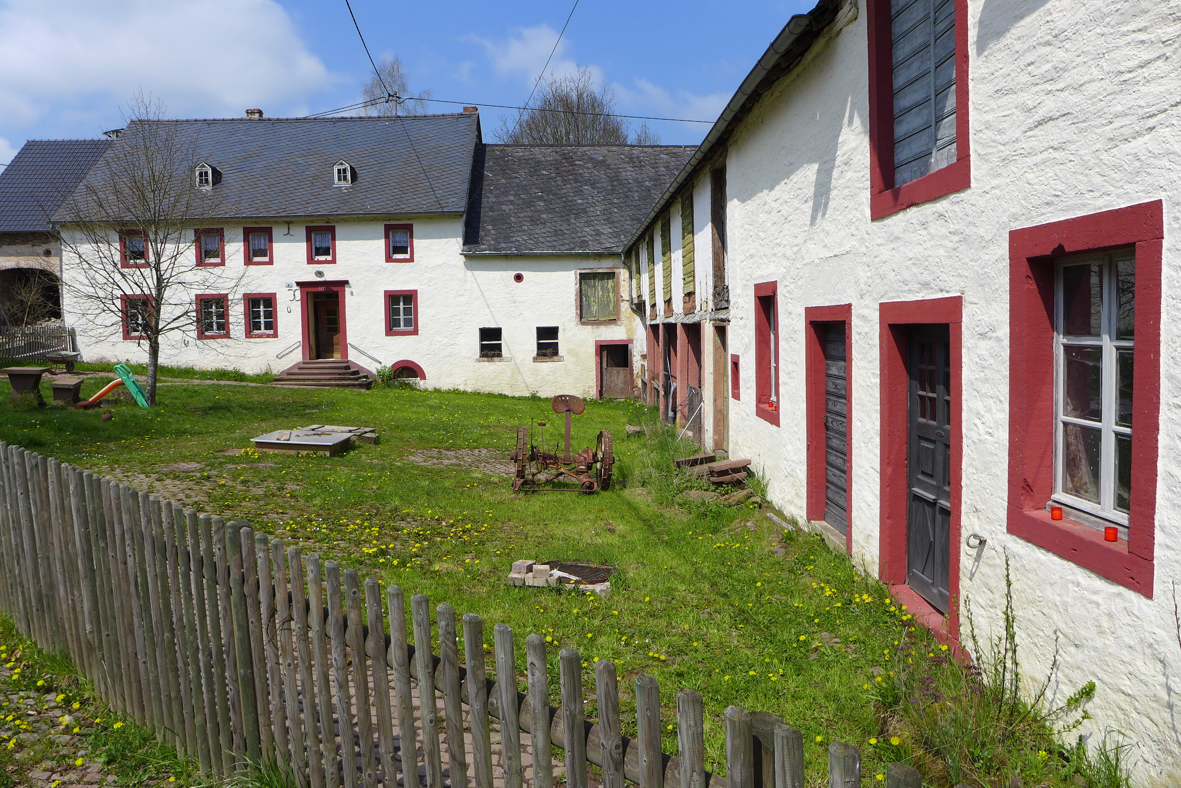 Nimsreuland: Winkelhof, Mitte des 19. Jahrhunderts mit älteren Resten